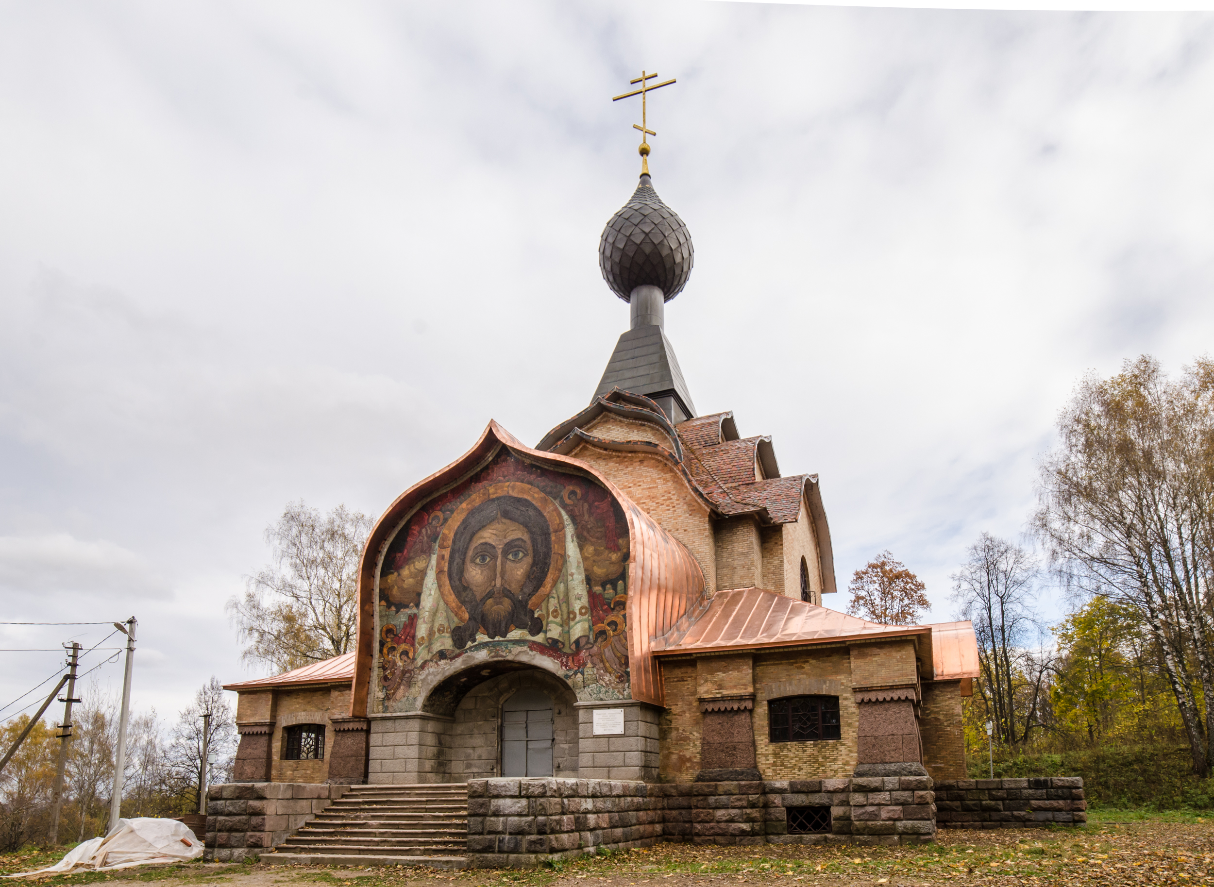 Церковь Сошествия Святого Духа: с. Фленово, Талашкино, Смоленский район, Смоленская область